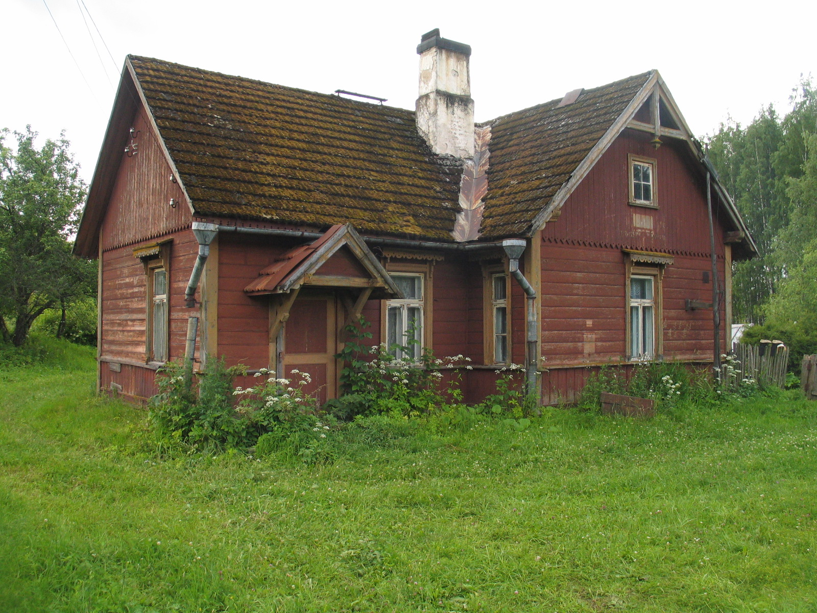 Laanametsa jaamahoone